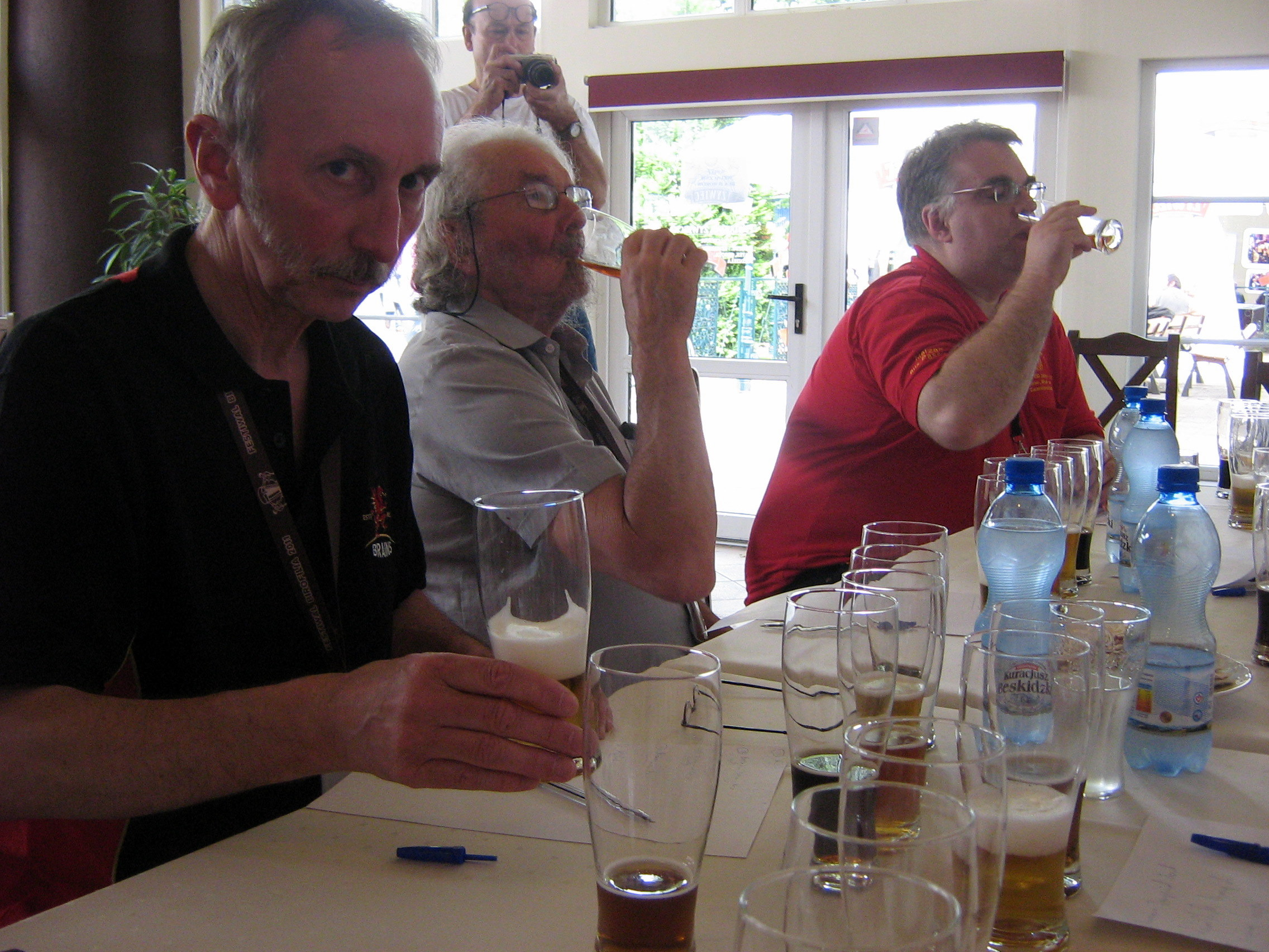 Sędziowie z Anglii, Walii i Niemiec oceniają piwa domowe